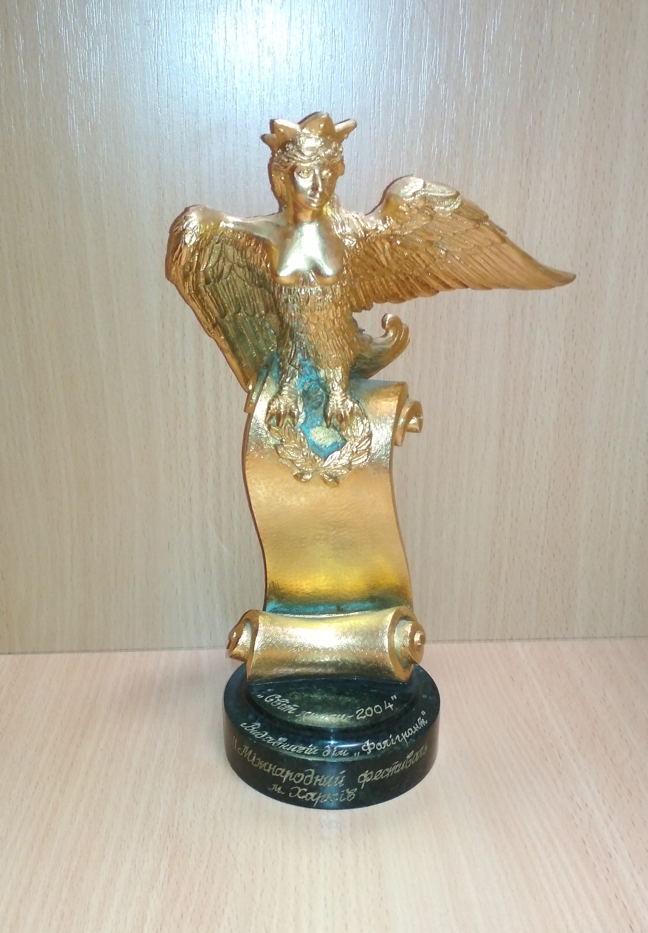 Нагорода в номінаціх "Книга року" - "Золота полиця" на VI міжнародному фестивалі "Світ книги-2004" у Харкові